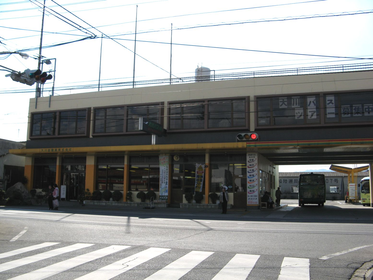 大川自動車本社